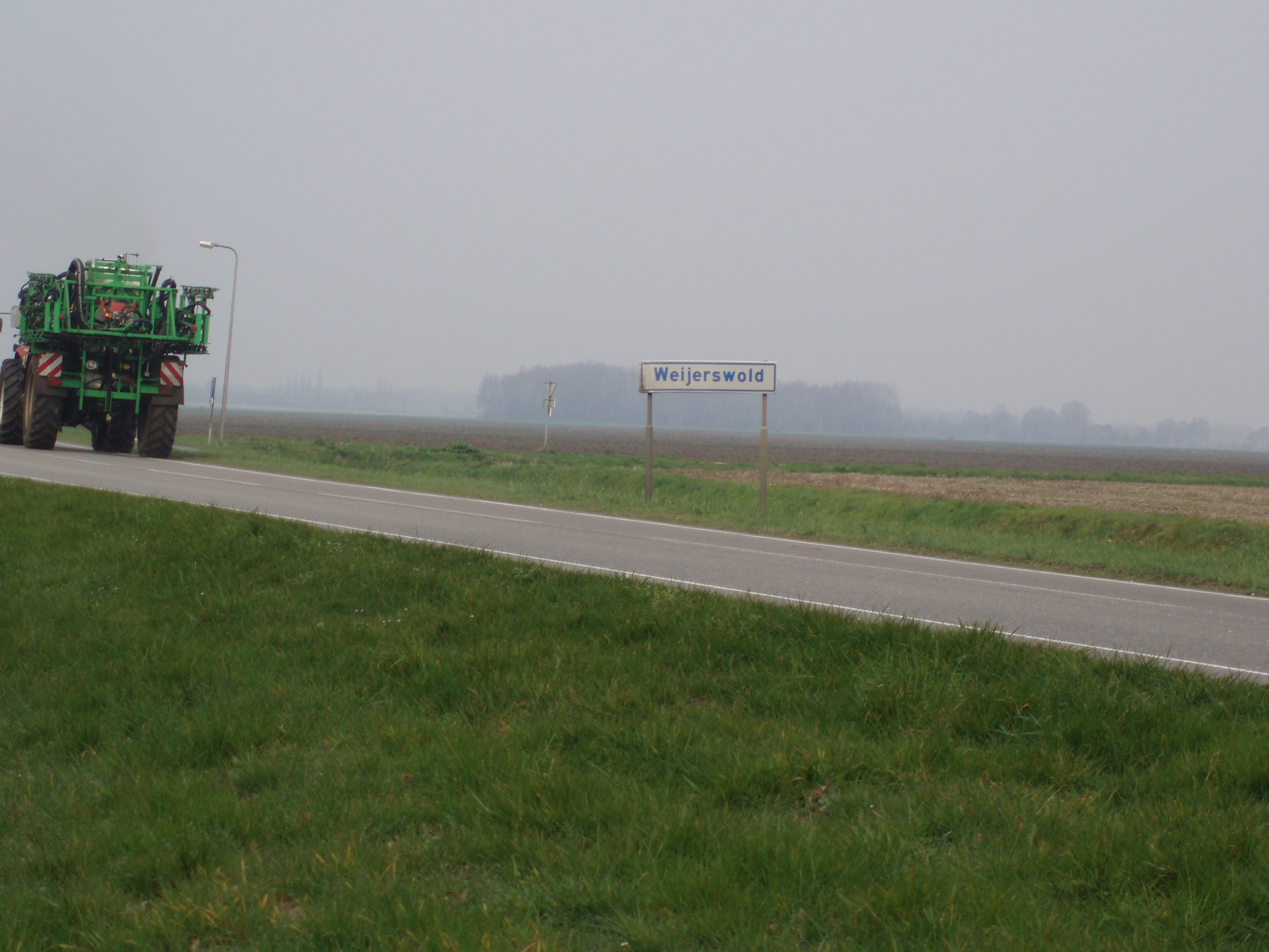 Weijerswold in de gemeente Coevorden op een mistige ochtend in april.